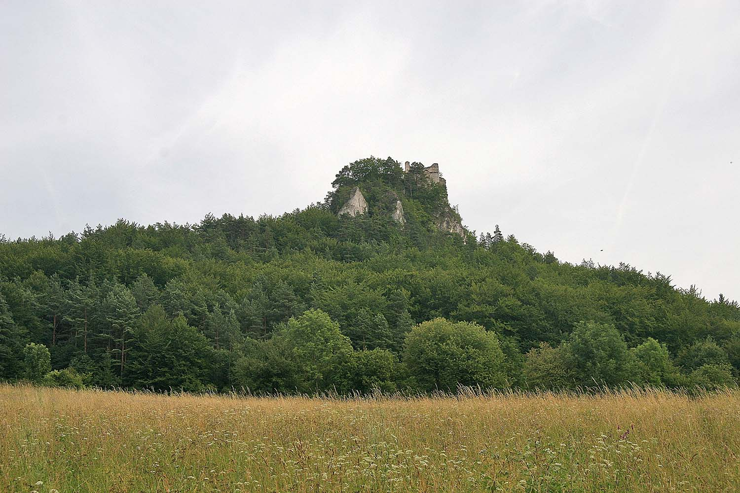 Castle Hričovský hrad from Hričovské Podhradie